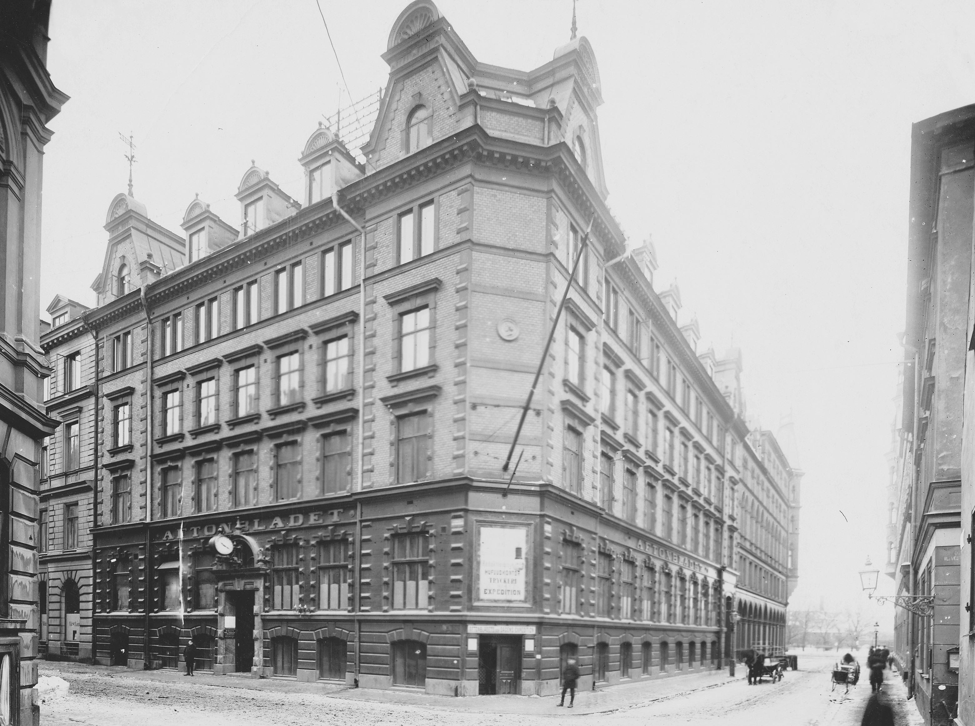 Aftonbladets tidningshus i kvarteret Fyrfotan minde